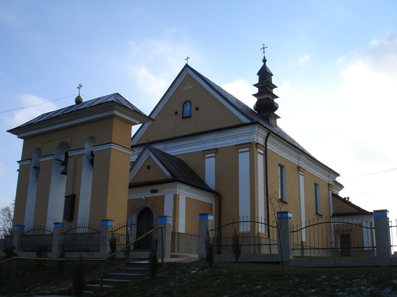 Poraż - kościół parafialny p.w. Oczyszczenia Marii